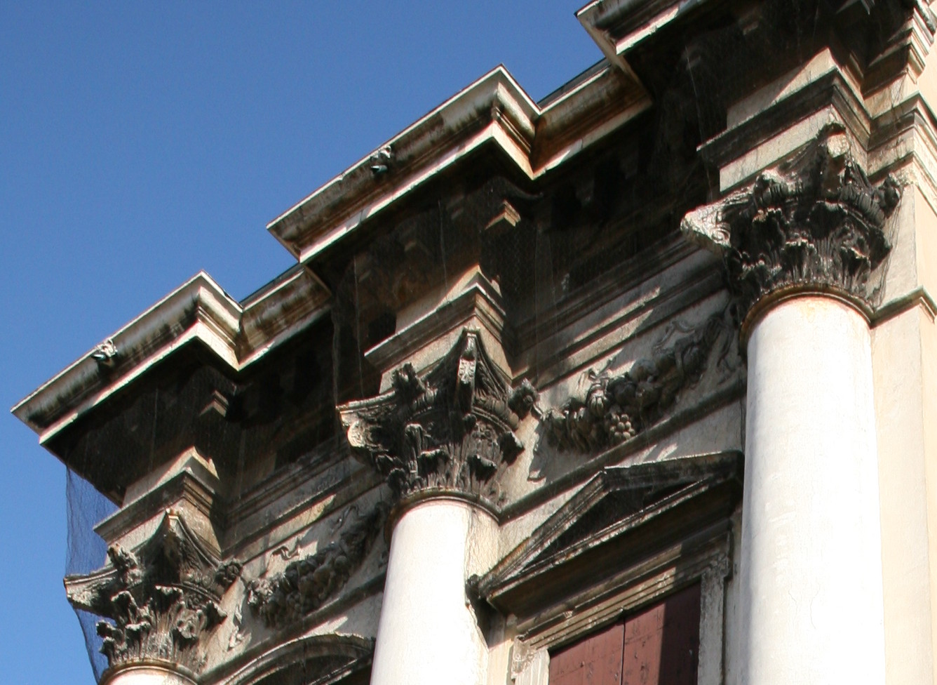 Palazzo Porto in piazza Castello (Vicenza) is a partially built palace by Andrea Palladio. Detail.